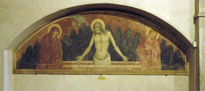 Imago pietatis